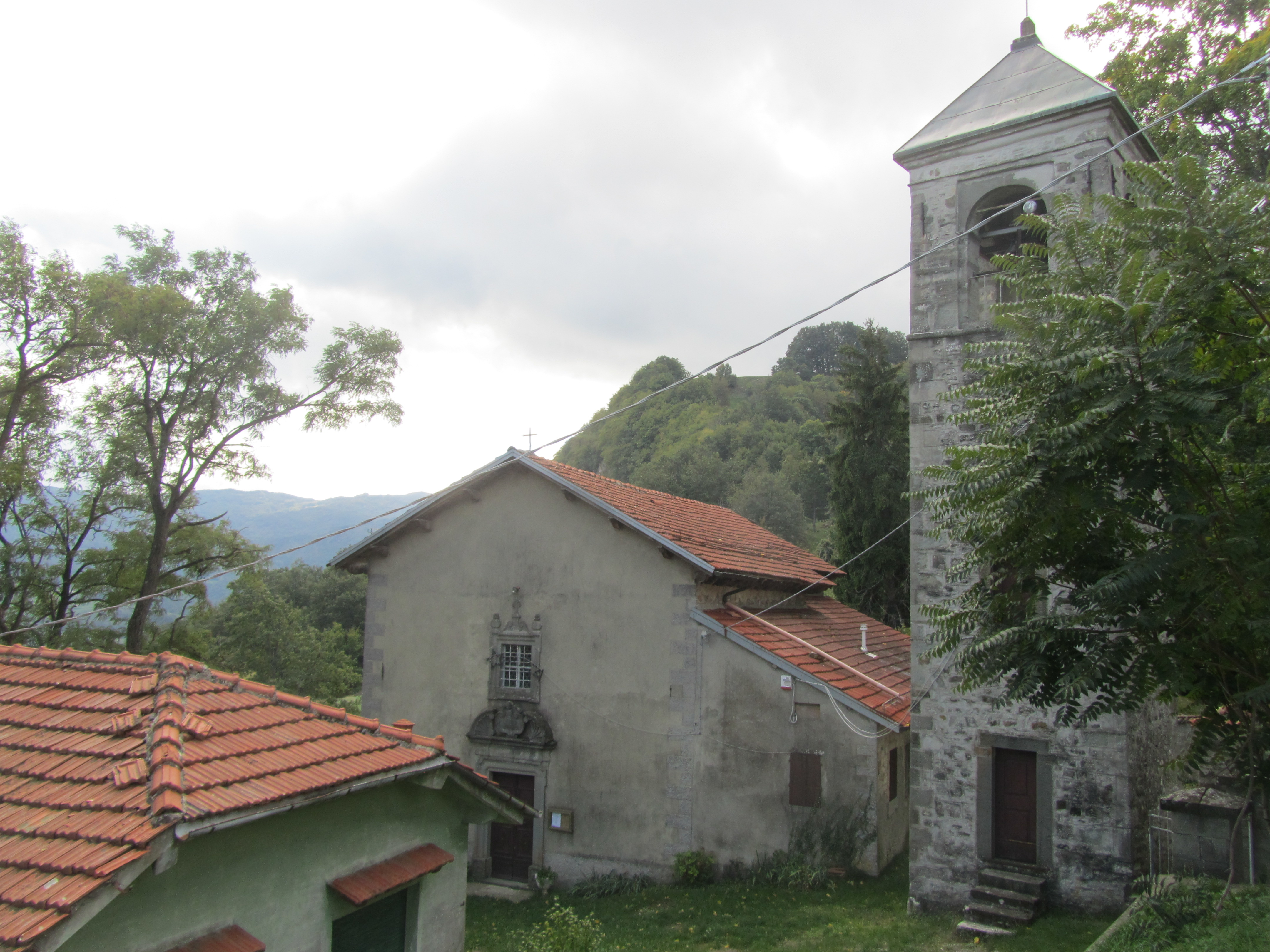 La chiesa di Vairo, provincia di Parma.